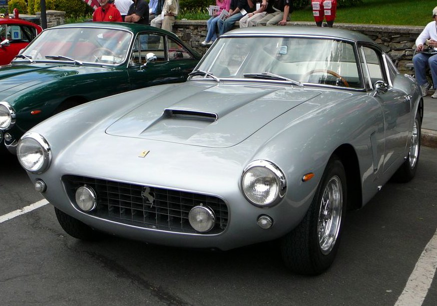 Ferrari 250 GT Berlinetta SWB